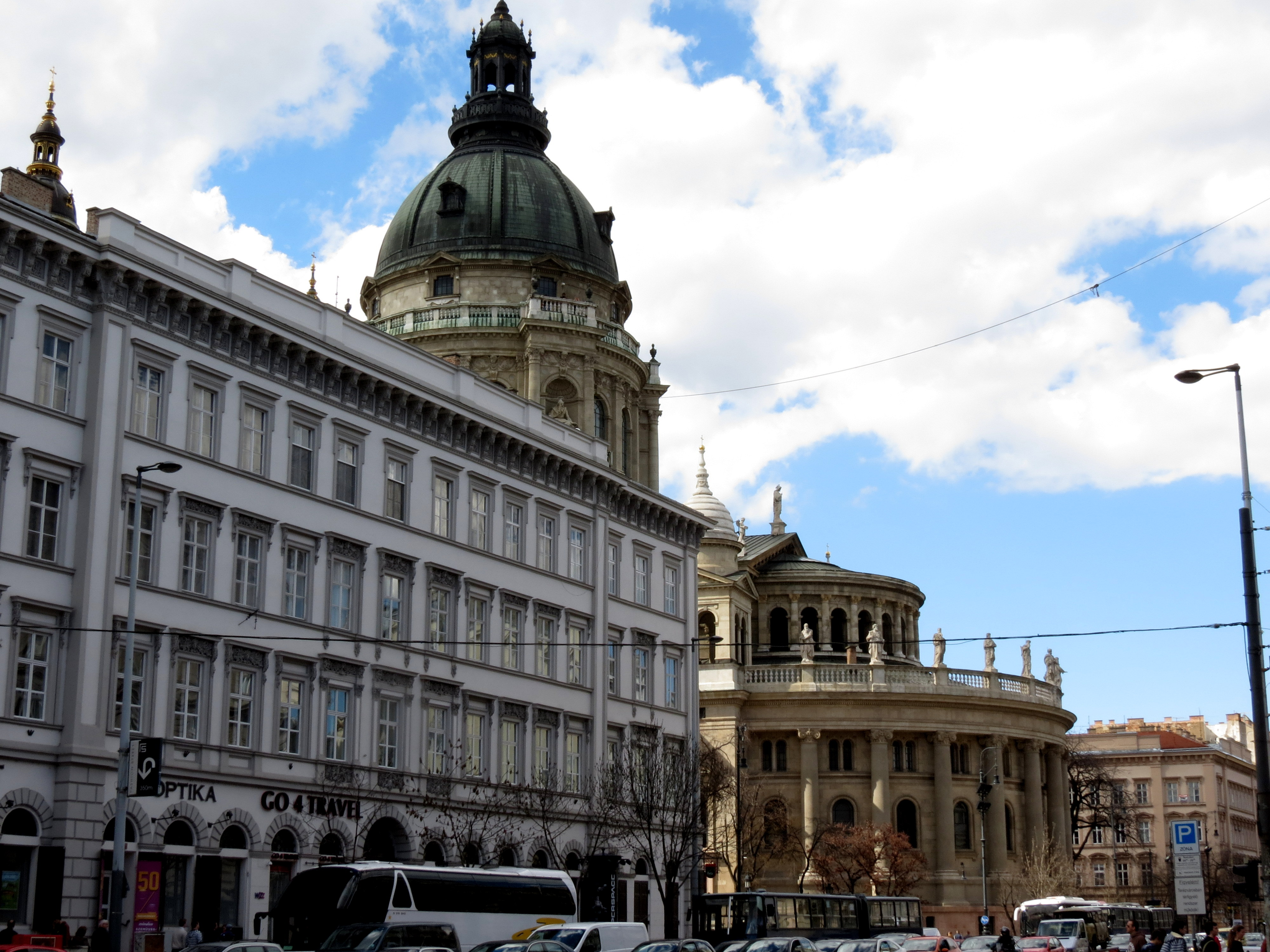 Budapest (41)